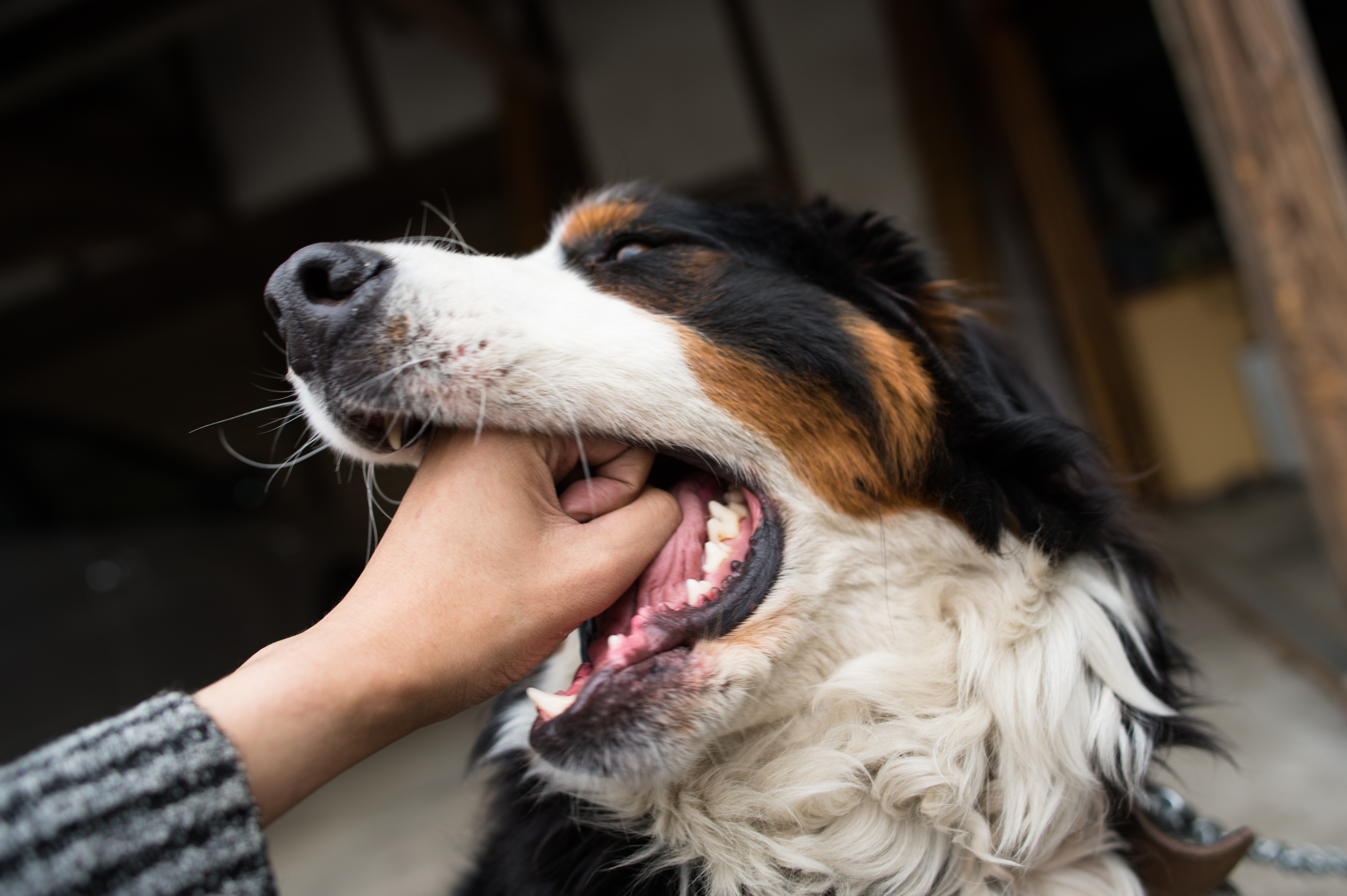 What! Miruku's mouth is larger than my hand! WARNING* Don't try this at home. A dog can bite you if you do like this. わ！みるくちゃんのお口は私の手よりもずっと大きい！ 手が口の中にすっぽり入ってしまいます。 ※犬の口にむやみに手を入れると噛まれることがあります。よい子はマネしないでね。 [ Nikon D4, Nikon AF-S NIKKOR 28mm f/1.8G, f/2.8, 1/250sec, ISO280, Lightroom 4.3 ]